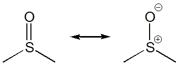 Struktur: Tor Svensson